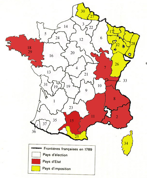 Généralités in France in 1789, showing pays d'état and pays d'élection